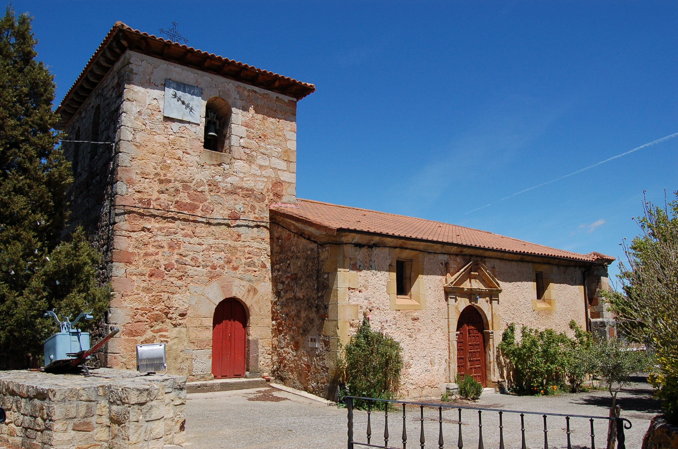 Iglesia de Mamolar